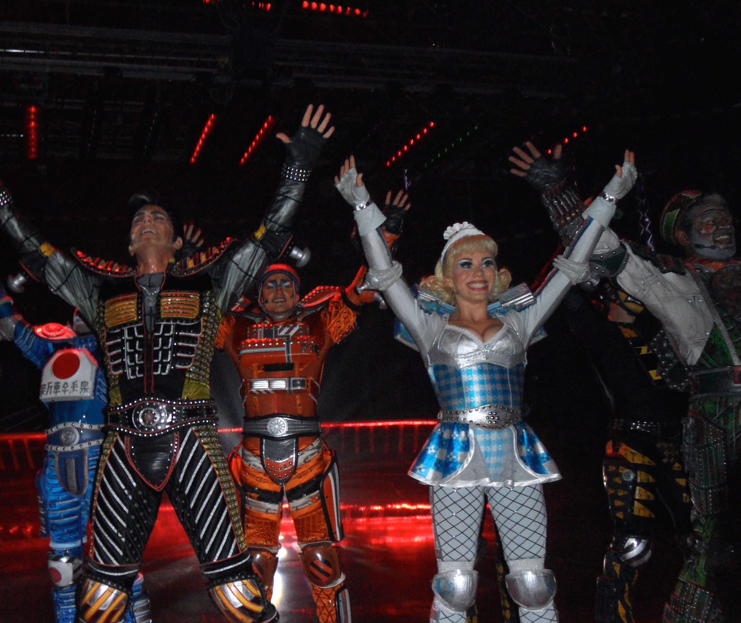 Starlight Express Ensemble Bochum 2014